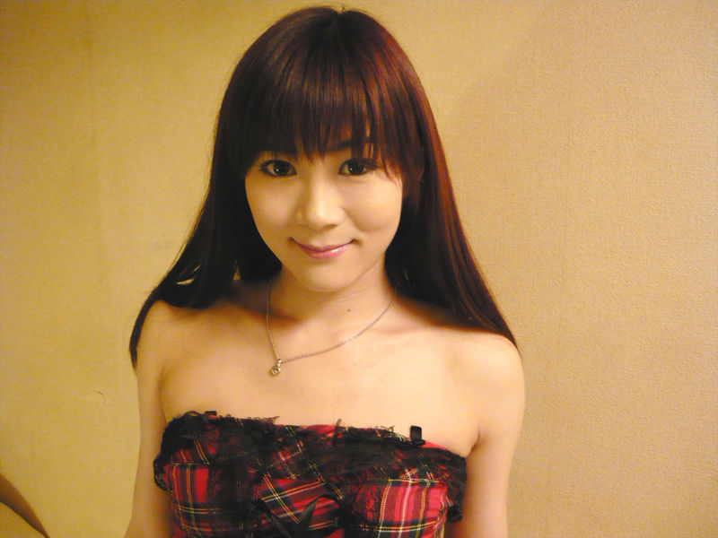 sankou